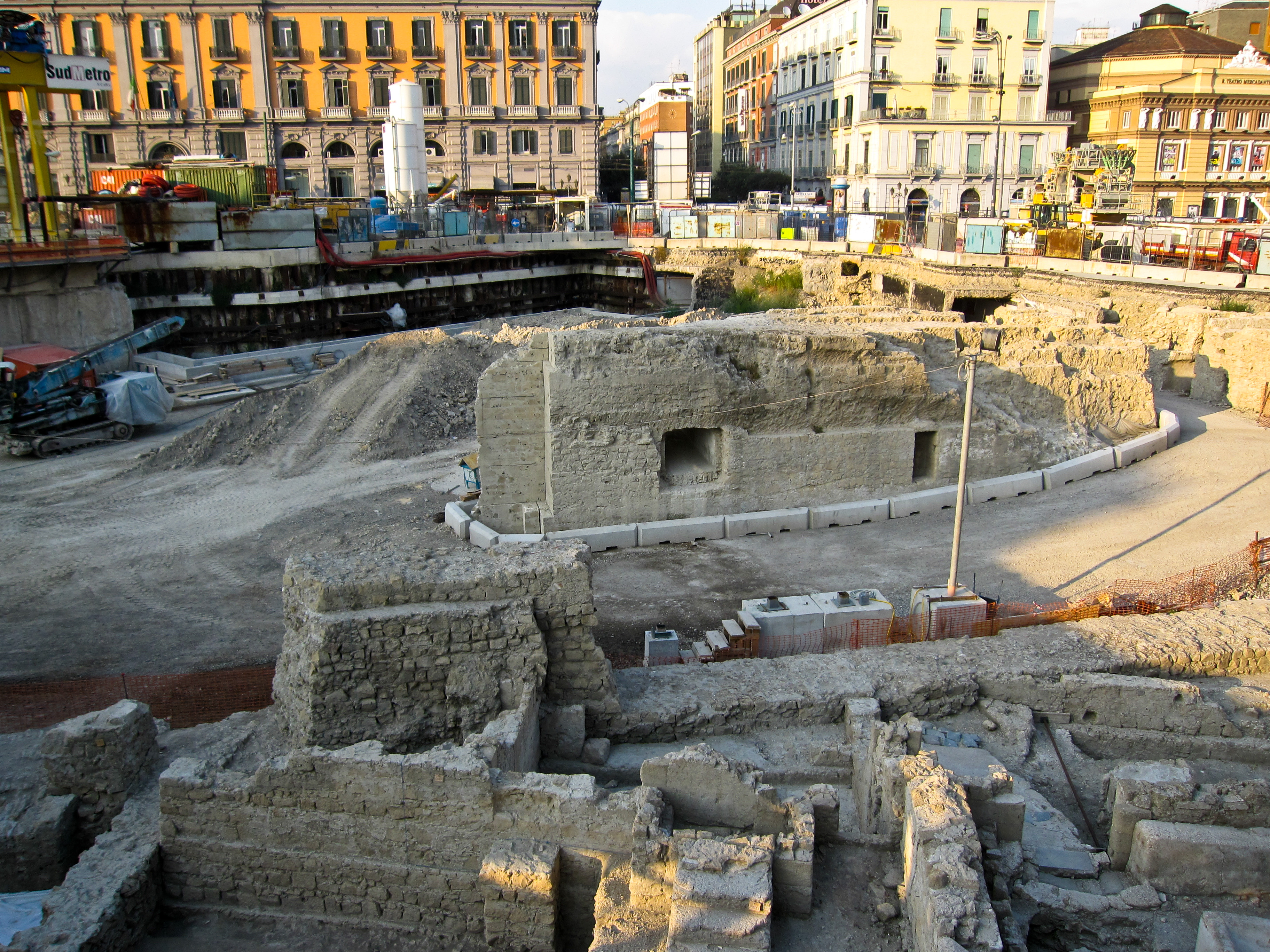 I lavori di scavo in Piazza Municipio per i lavori della Linea 1 della Metropolitana che hanno portato alla luce reperti archeologici di grande interesse.